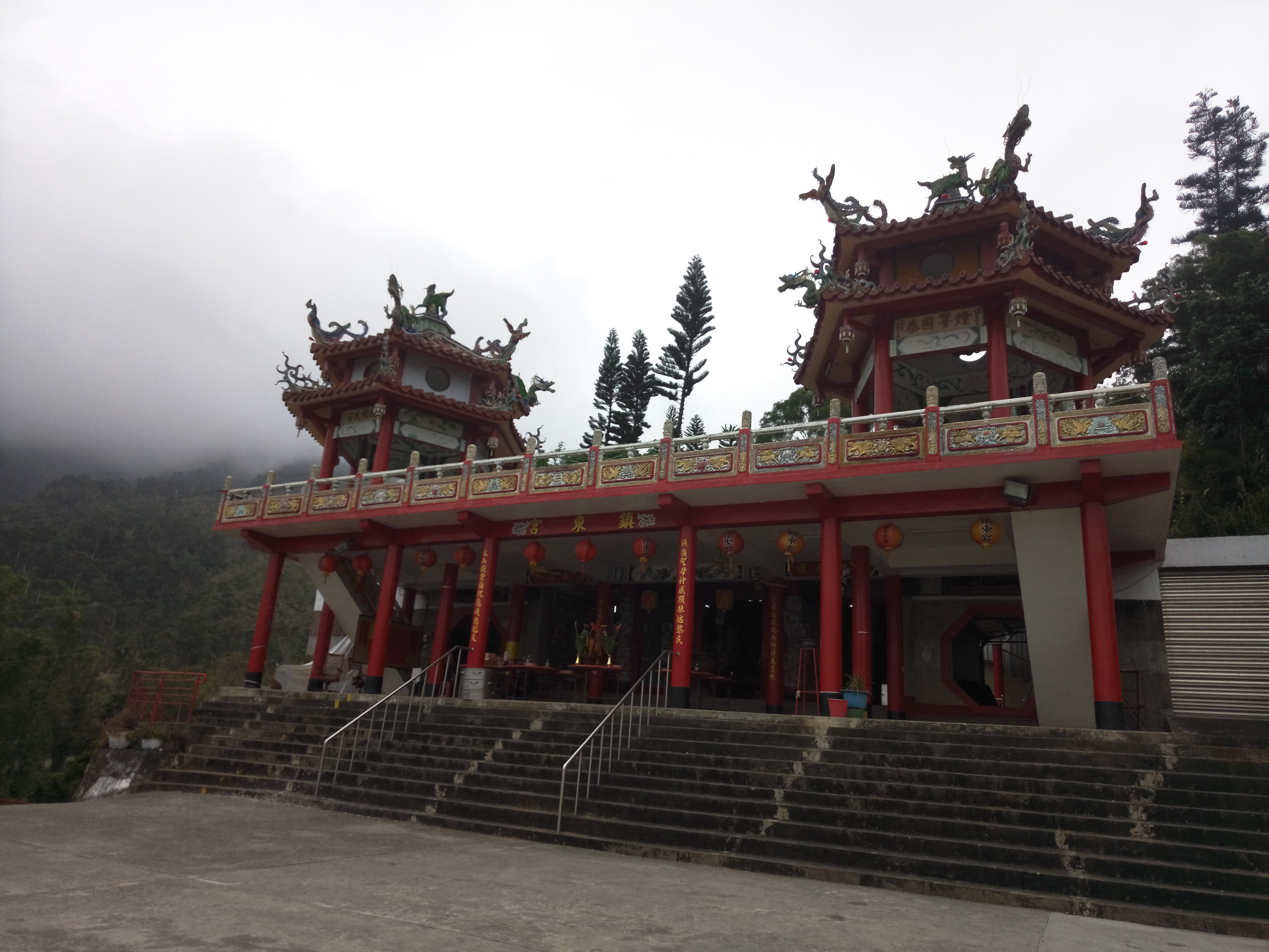 初鹿鎮東宮主殿